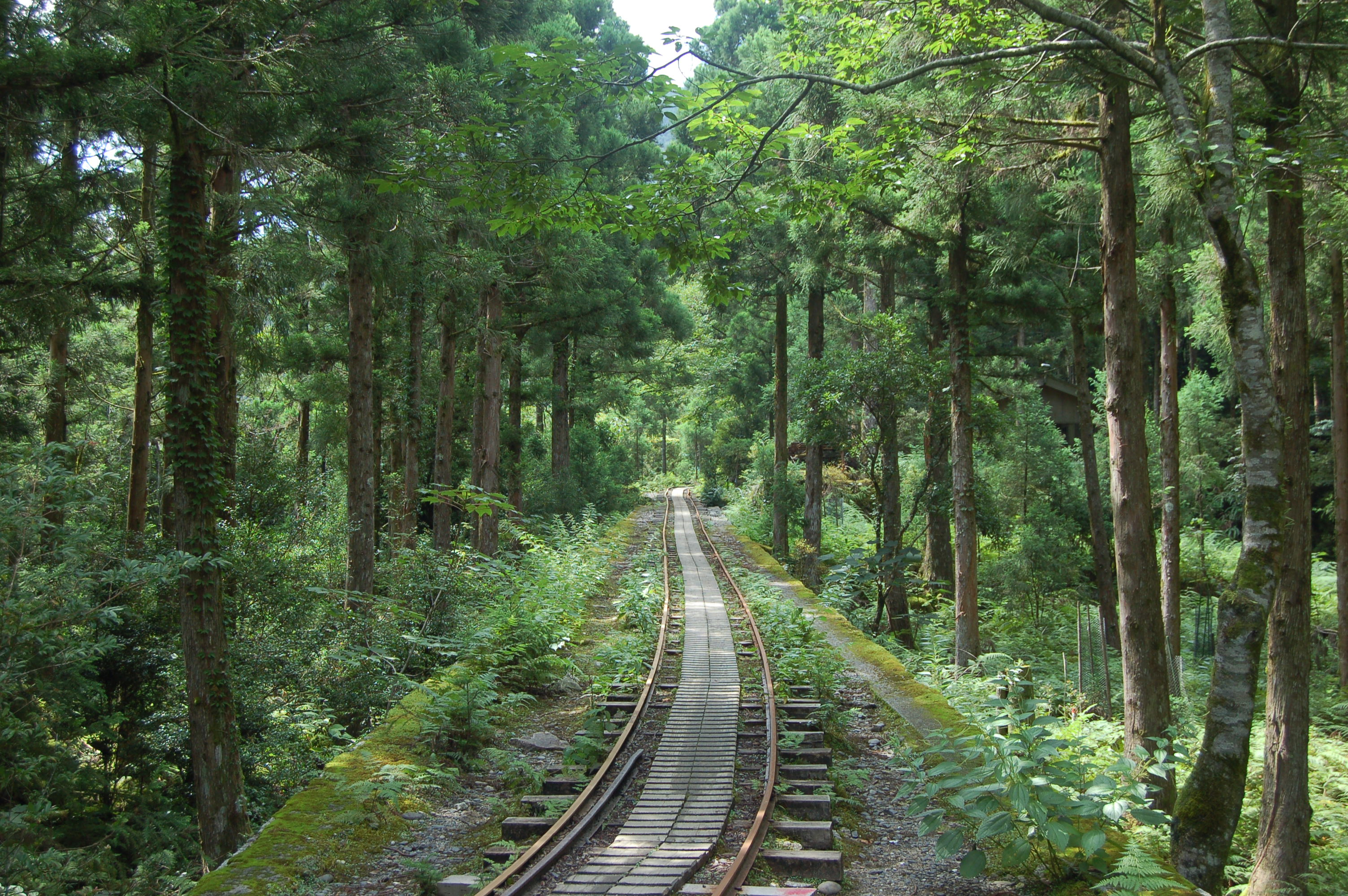 屋久島の縄文杉登山道へ続くトロッコ軌道。